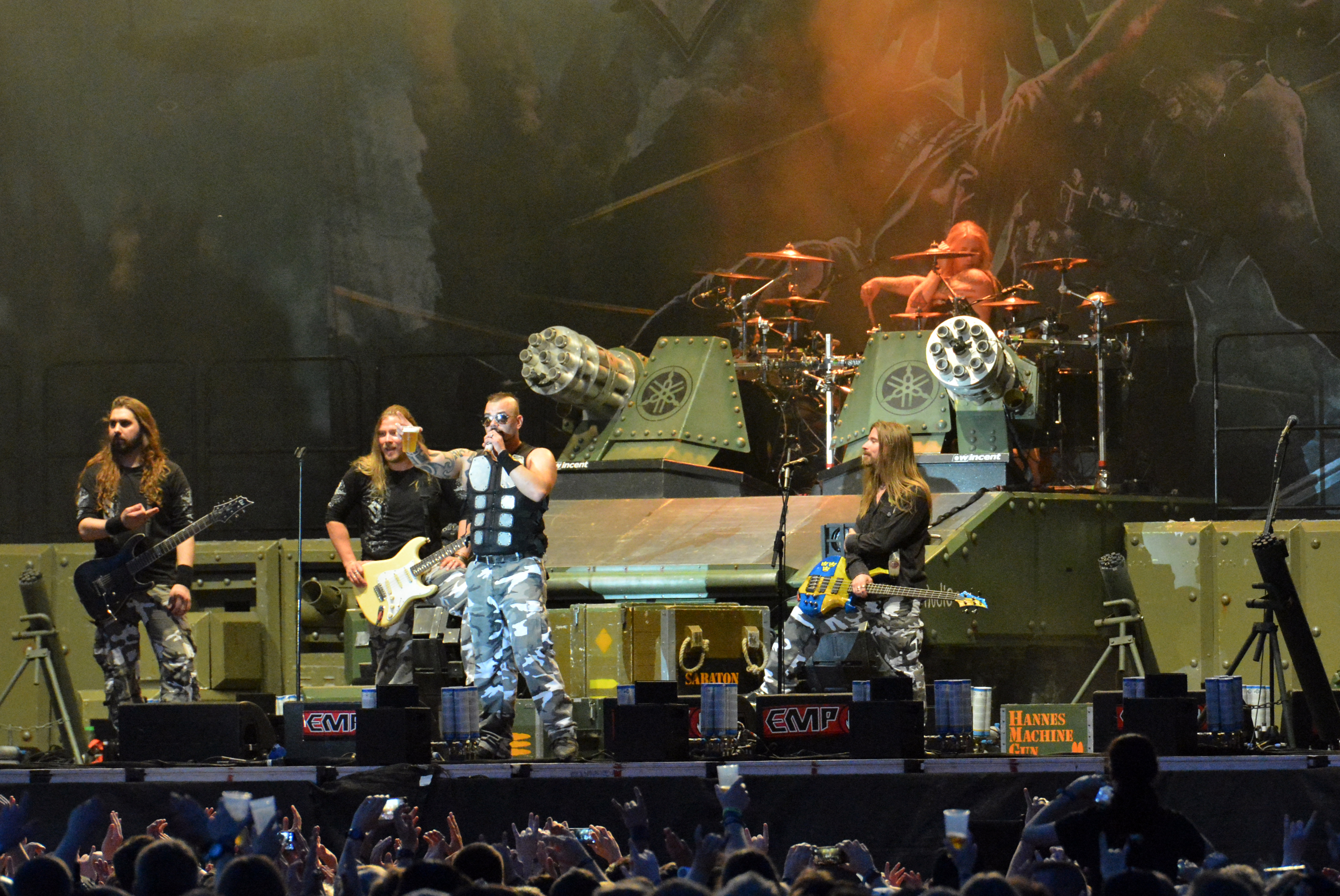 Sabaton beim Elbriot 2016